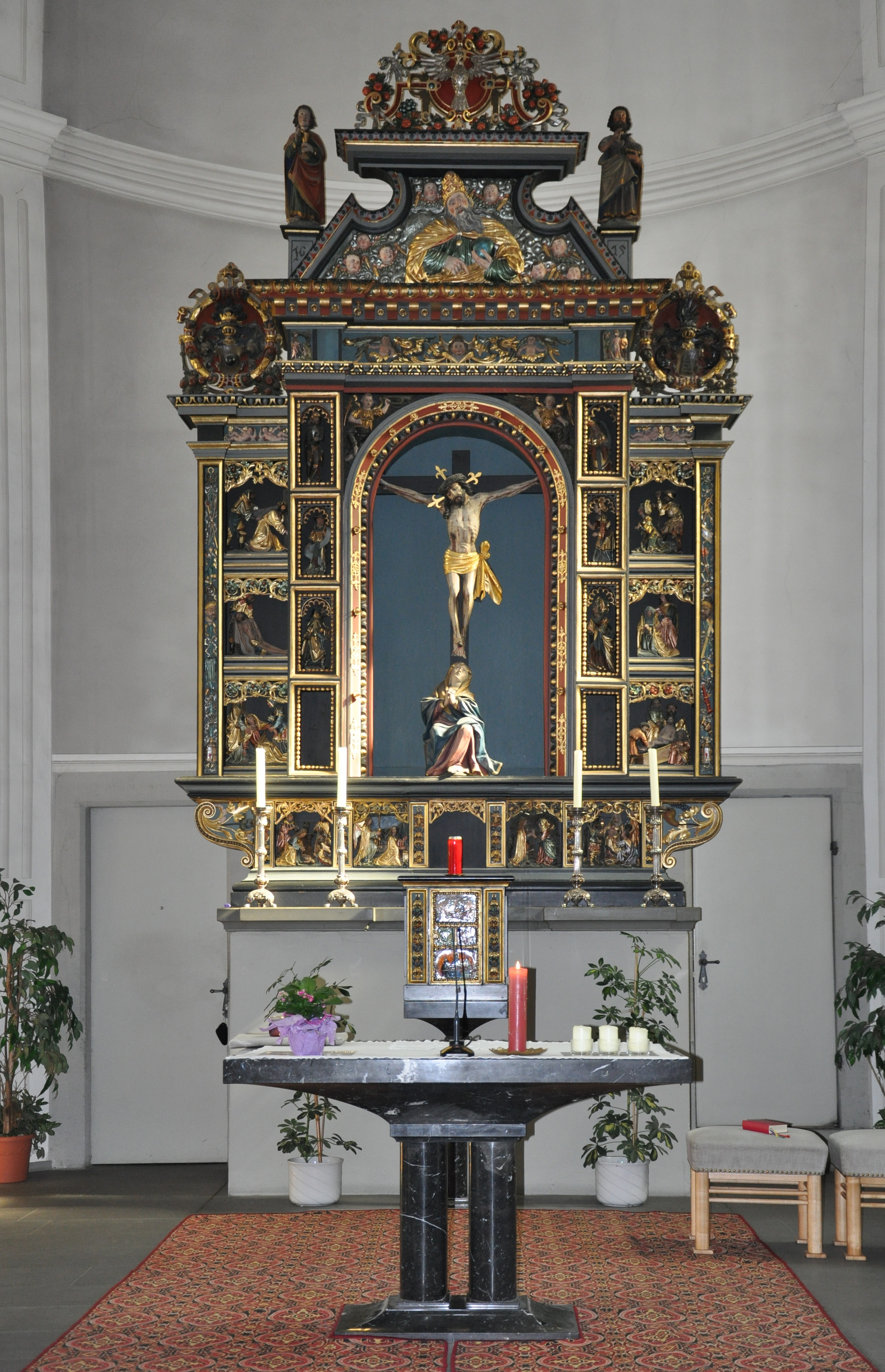 Bregenz, Seekapelle, Hochaltar von Esaias Gruber aus der ehemaligen Schlosskapelle in Schloss Hofen (Lochau)